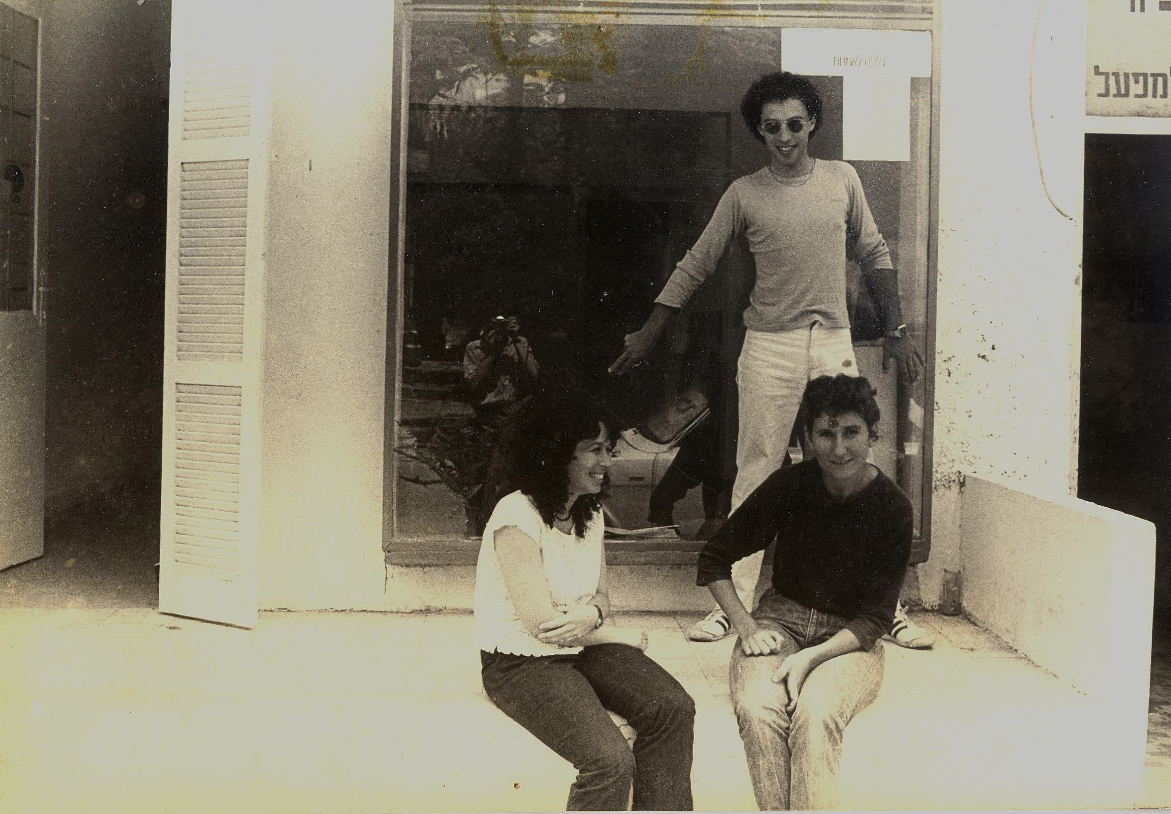 מקימי גלריה אחד העם 90 מימין לשמאל שרה חינסקי, אריה ברקוביץ' (עומד) ורונית דברת בפתח הגלריה